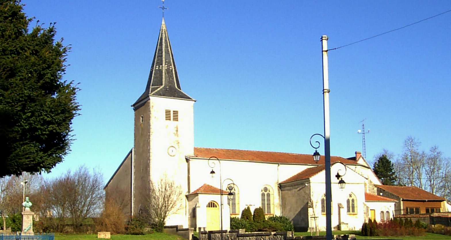 L'église Saint-Rémy à Tantonville